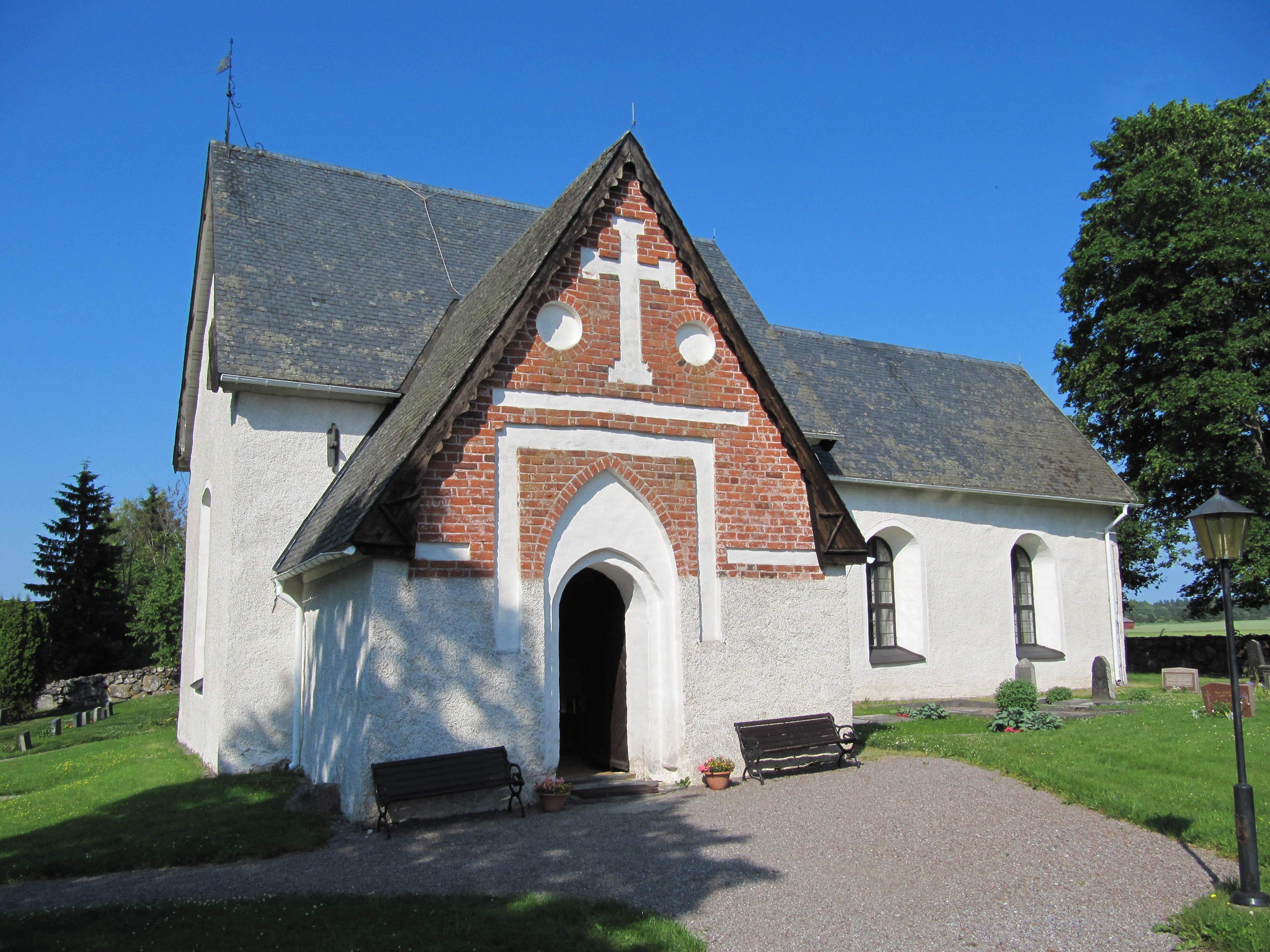 Vidbo kyrka